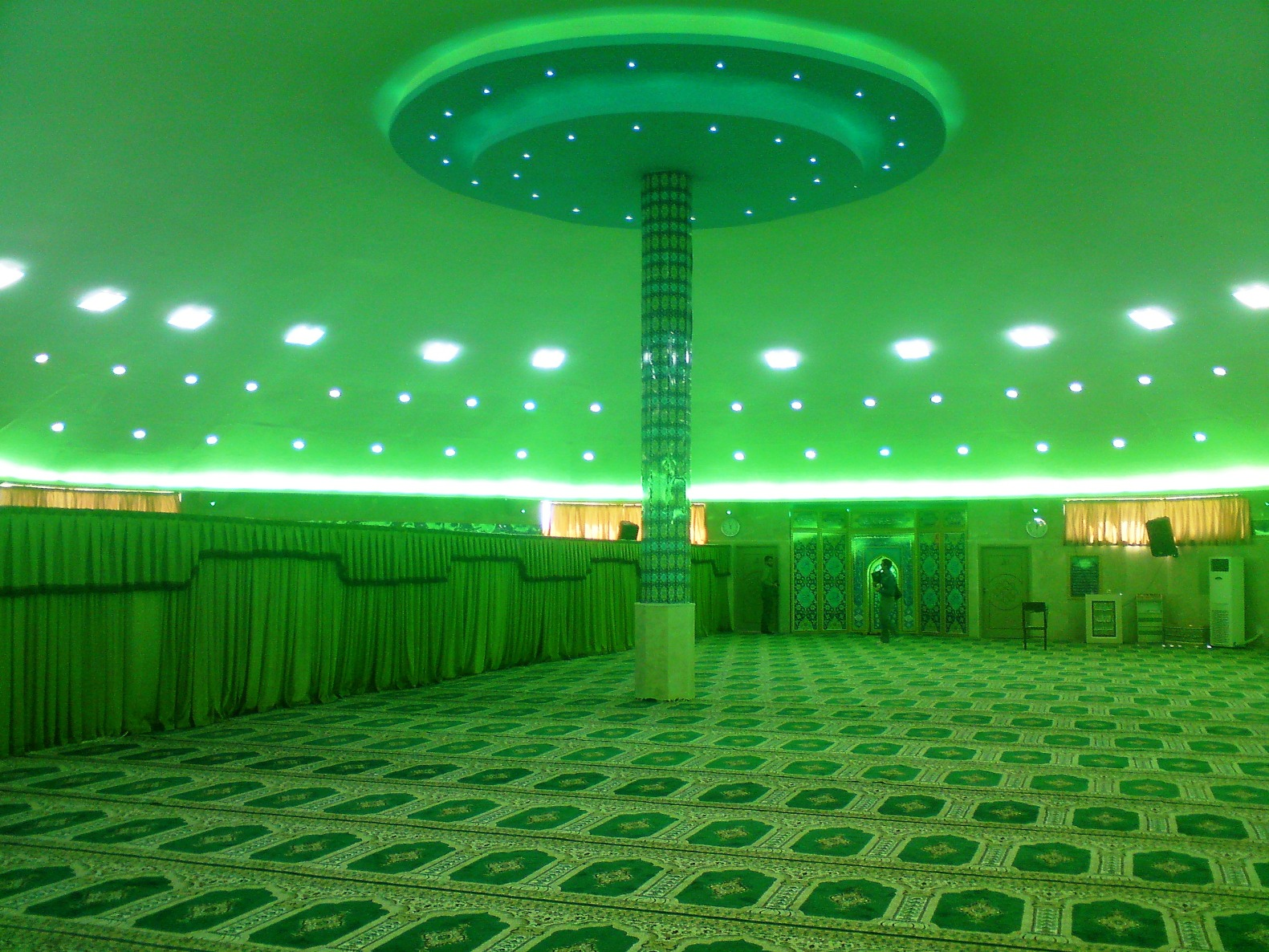 نمای داخلی مسجد زیبا و مدرن دانشگاه صنعتی سیرجان